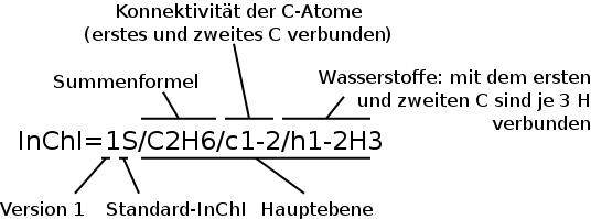 InChI-Code von Ethan mit Annotation der Code-Bestandteile